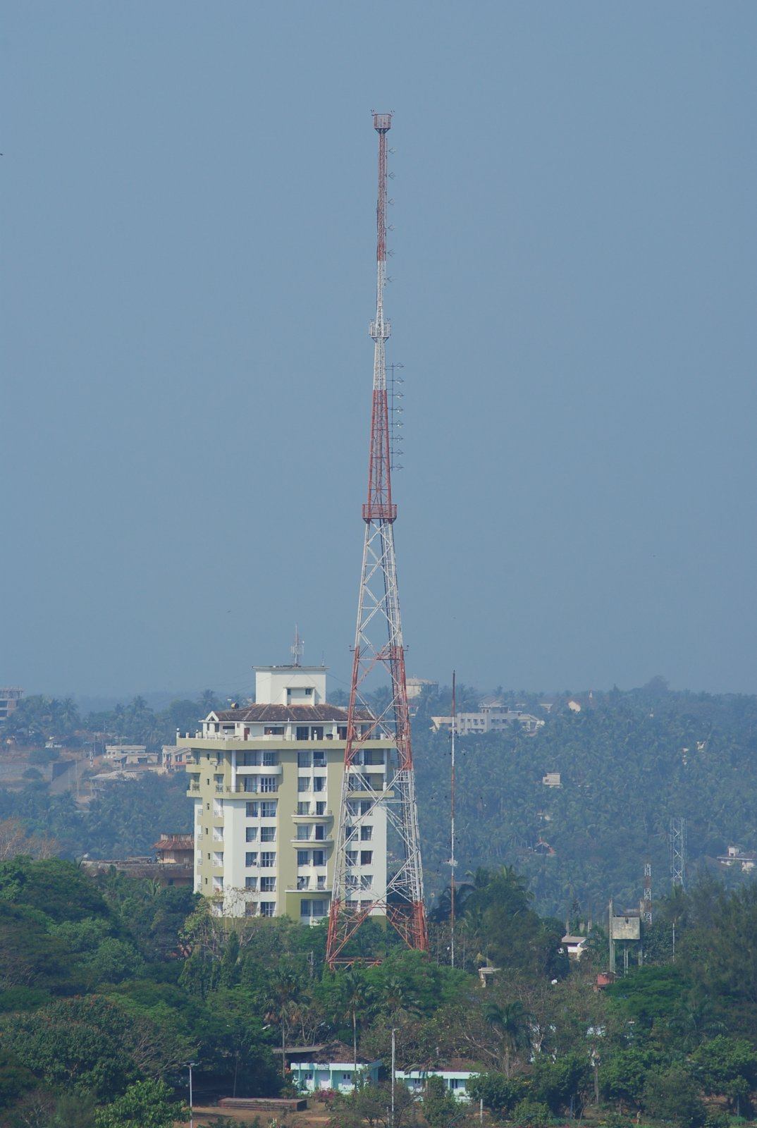 AIR FM Tower at Kadri, Mangalore